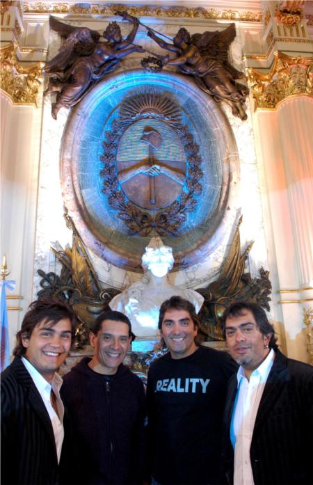 Los Nocheros en la Casa Rosada, Buenos Aires.